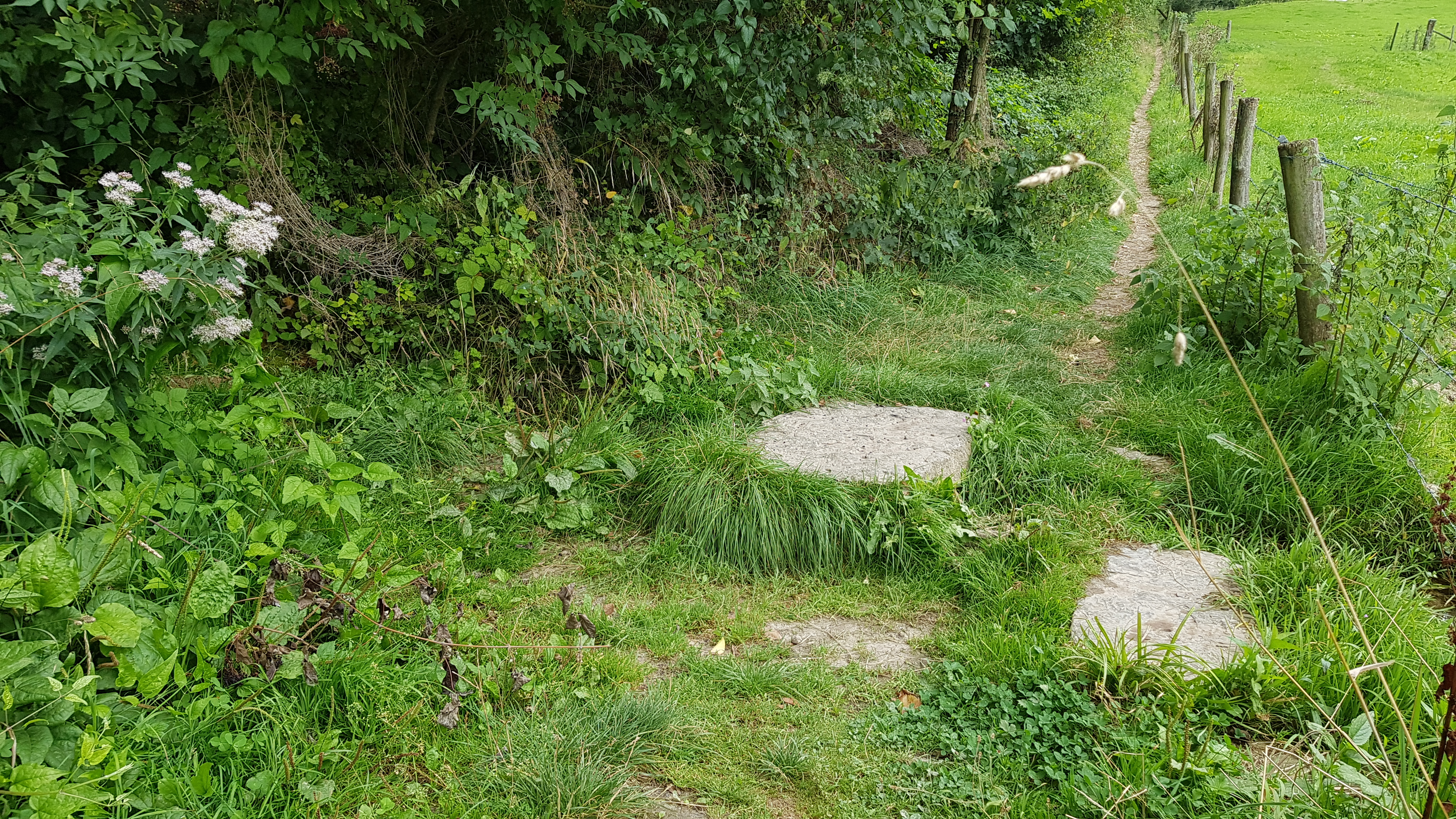 bron van de Putberg, bij Ubachsberg, Nederland